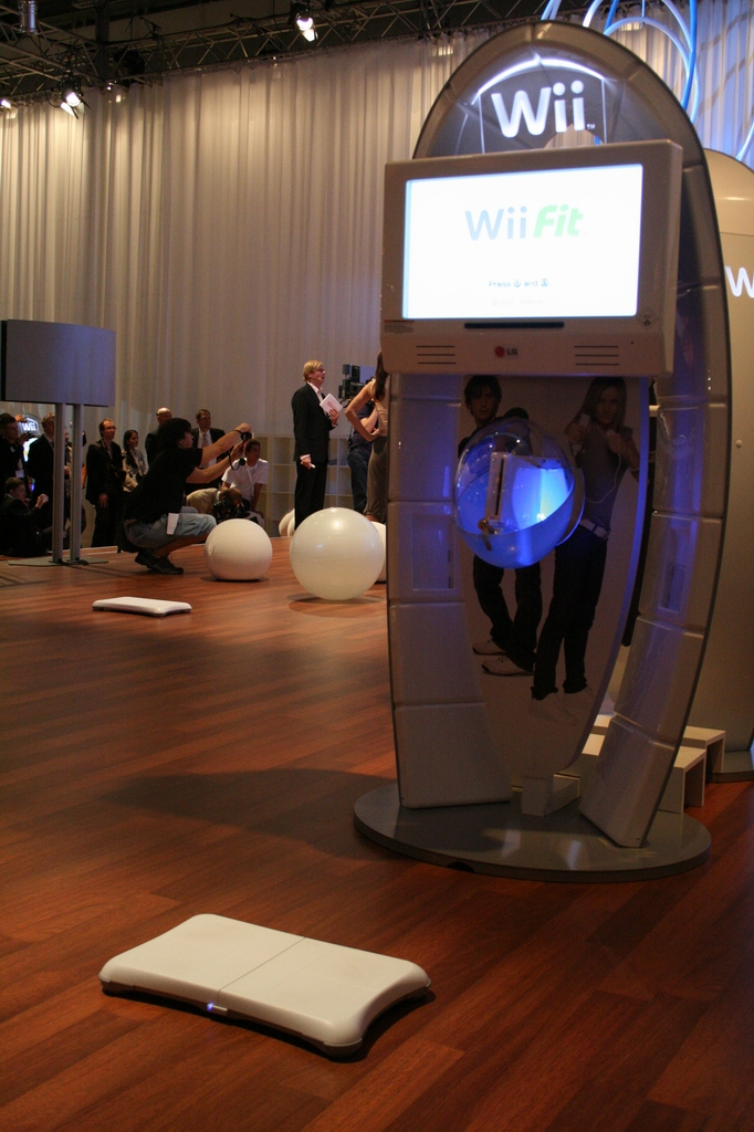 Wii Fit stand egy videójáték-kiállításon Lipcsében